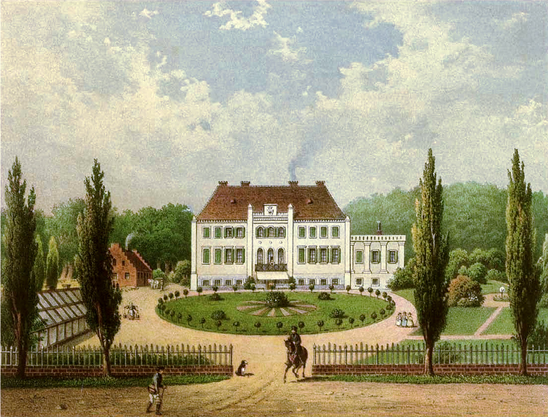 Schloss Besswitz, Kreis Schlawe, Provinz Pommern